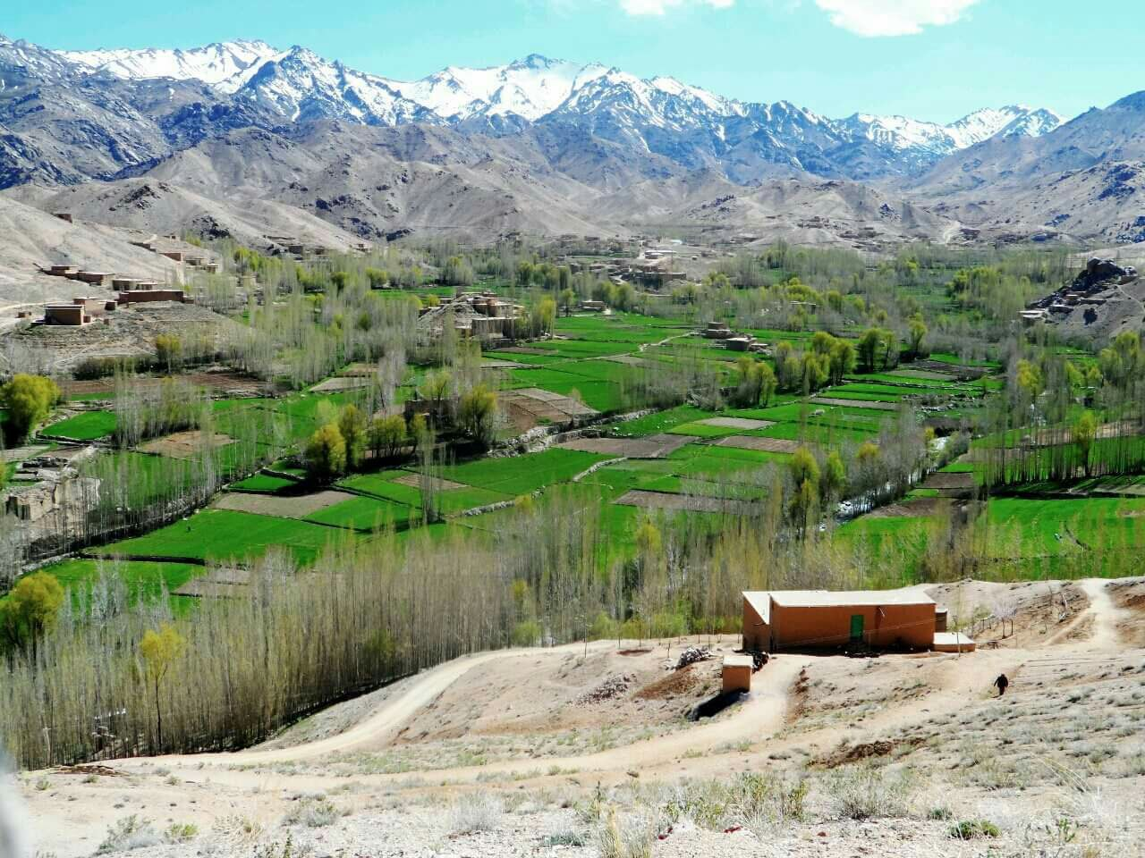 نمای زیبا از زمینهای کشاورزی المیتو